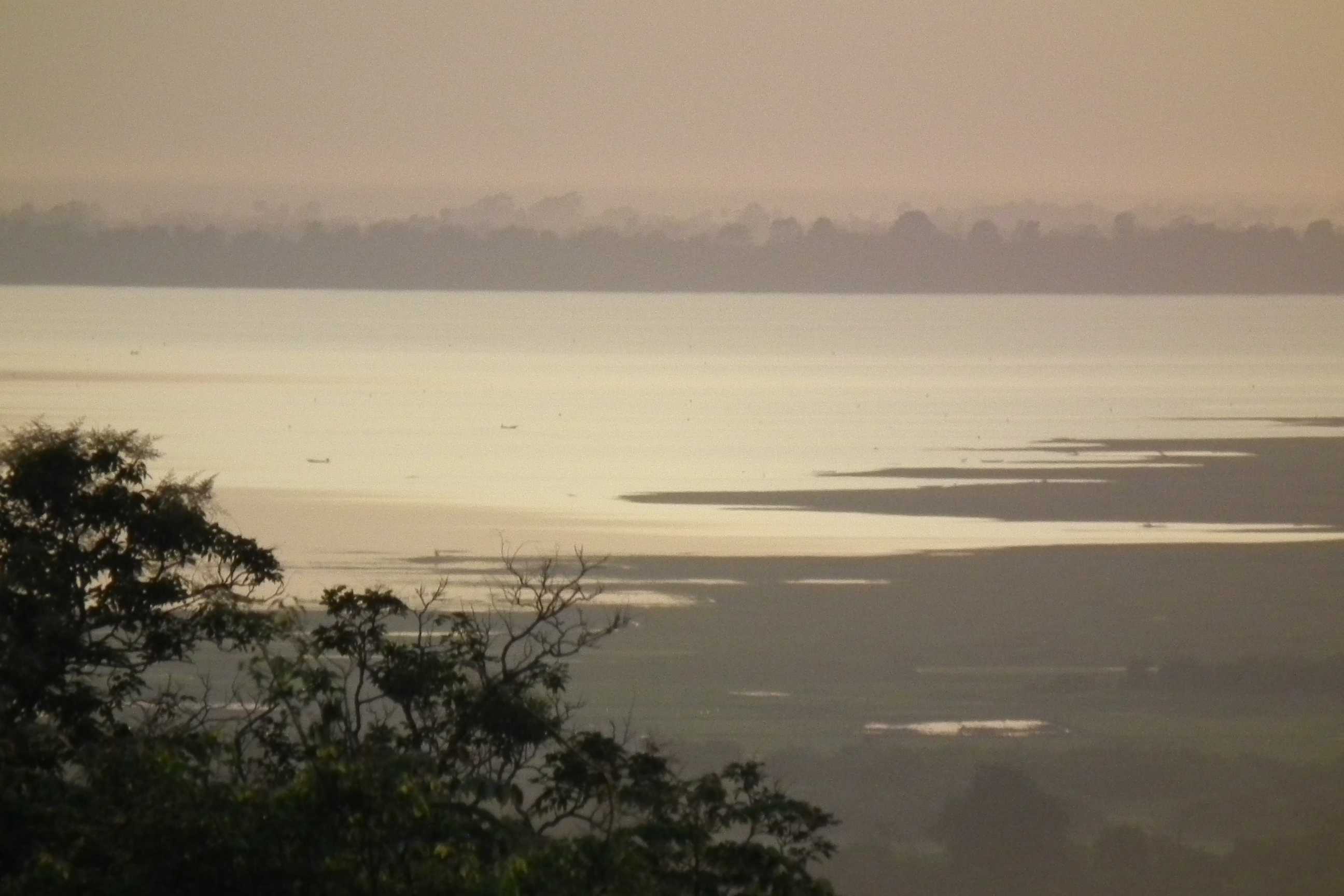 Angkor Phnom Bakheng アンコール・プノンバケン